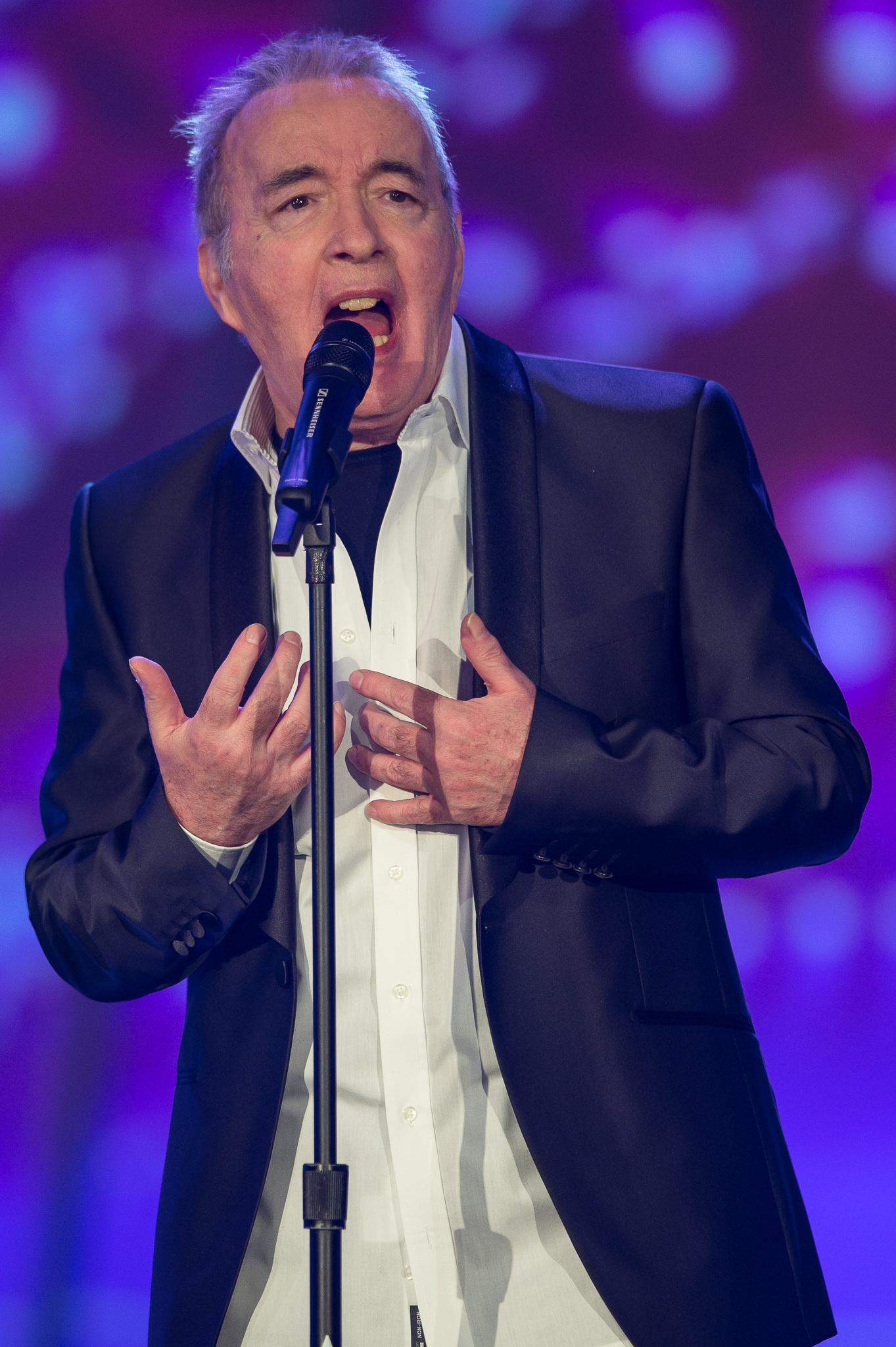 BR,Barry Ryan,Bayerisches Fernsehen,Frankenhalle,Live-Sendung,Sternstunden-Gala,Sternstundengala